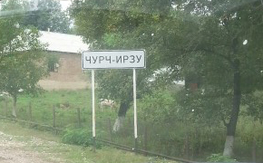 Нохчийн: Чурч-Ирзу